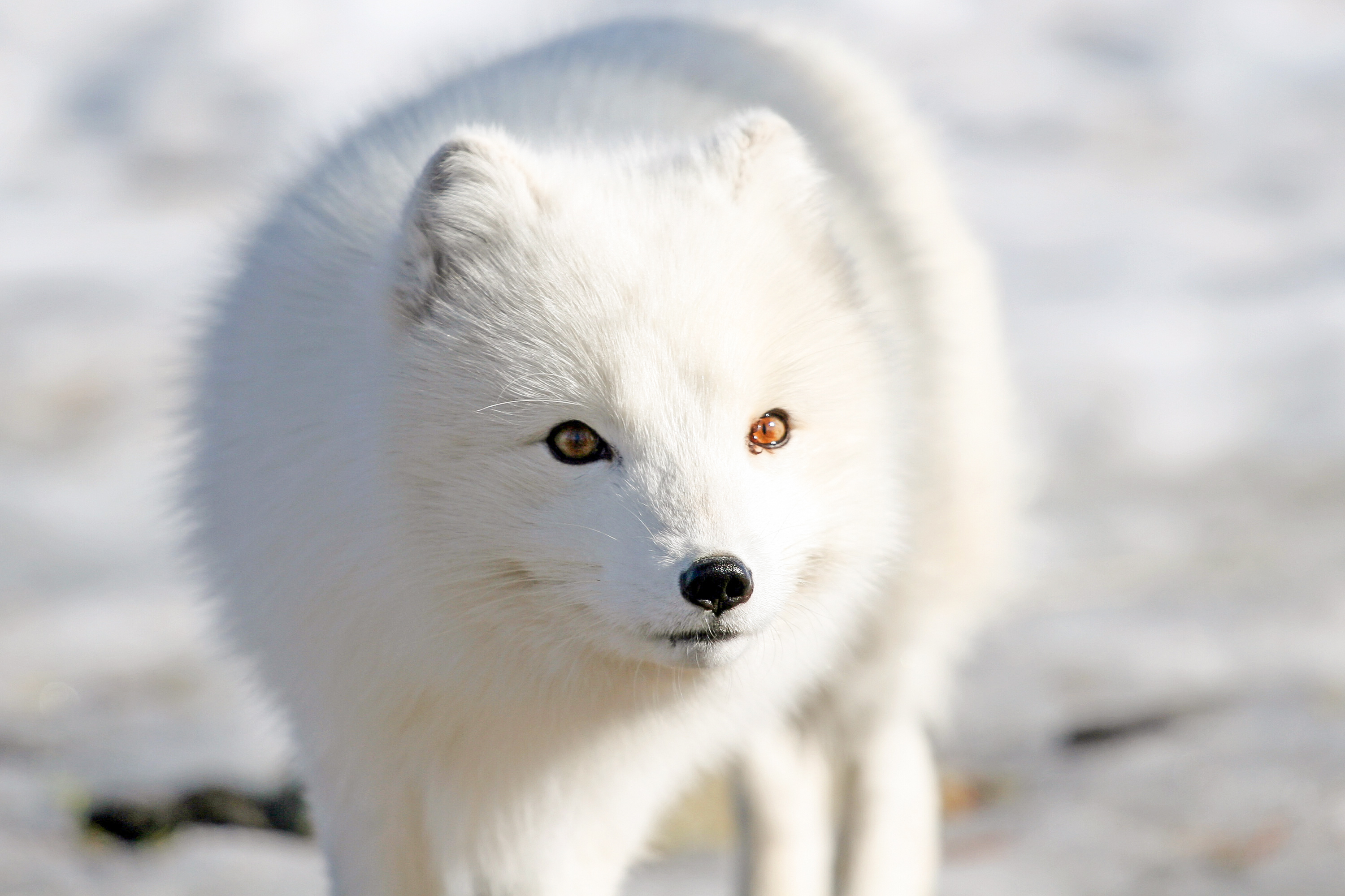 Fjellrev (eller polarrev) i Langedrag Naturpark. / Arctic fox in Langedrag Wildlife Park, Norway. Bruk gjerne bildet, så lenge du krediterer meg. / Feel free to use, but please credit me.